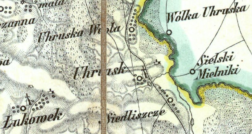 Uhrusk na mapie Reymanna, XIX w.